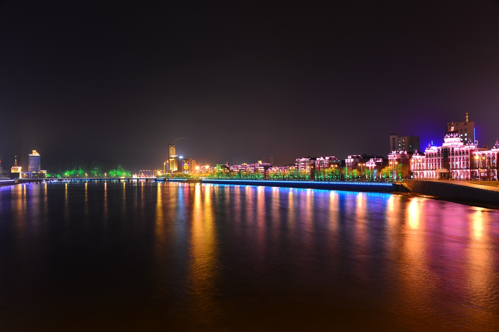 巡道工出品 photo by Xundaogong——浑江夜景